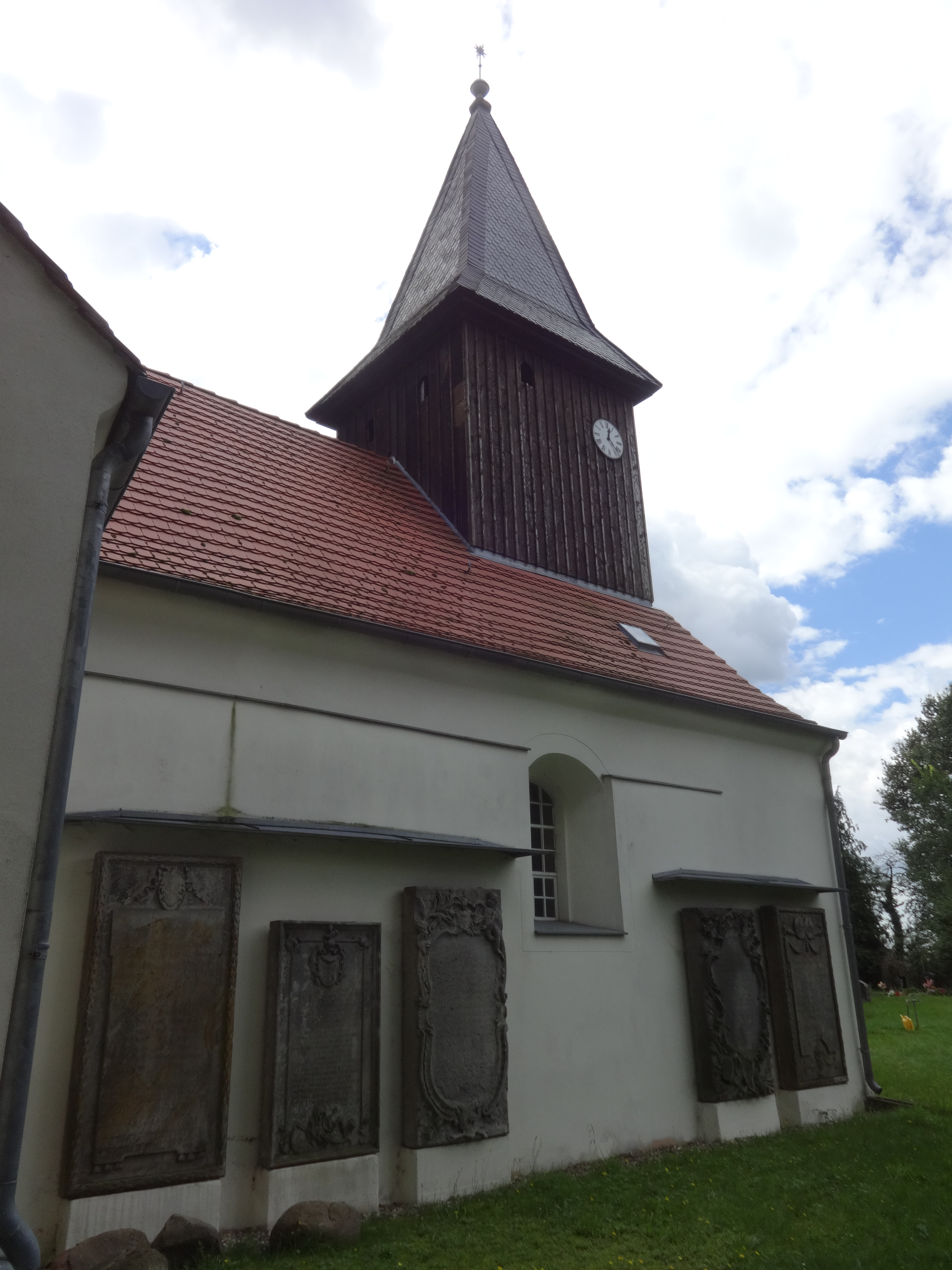 Die Dorfkirche in Genshagen ist ein Sakralbau, der vermutlich im 14. Jahrhundert errichtet wurde. 1707 erfolgte eine Erneuerung. Im Innern stehen unter anderem ein schlichter Kanzelaltar aus dem Jahr 1782. An der Fassade befinden sich mehrere Epitaphe, vorwiegend aus dem 18. Jahrhundert.